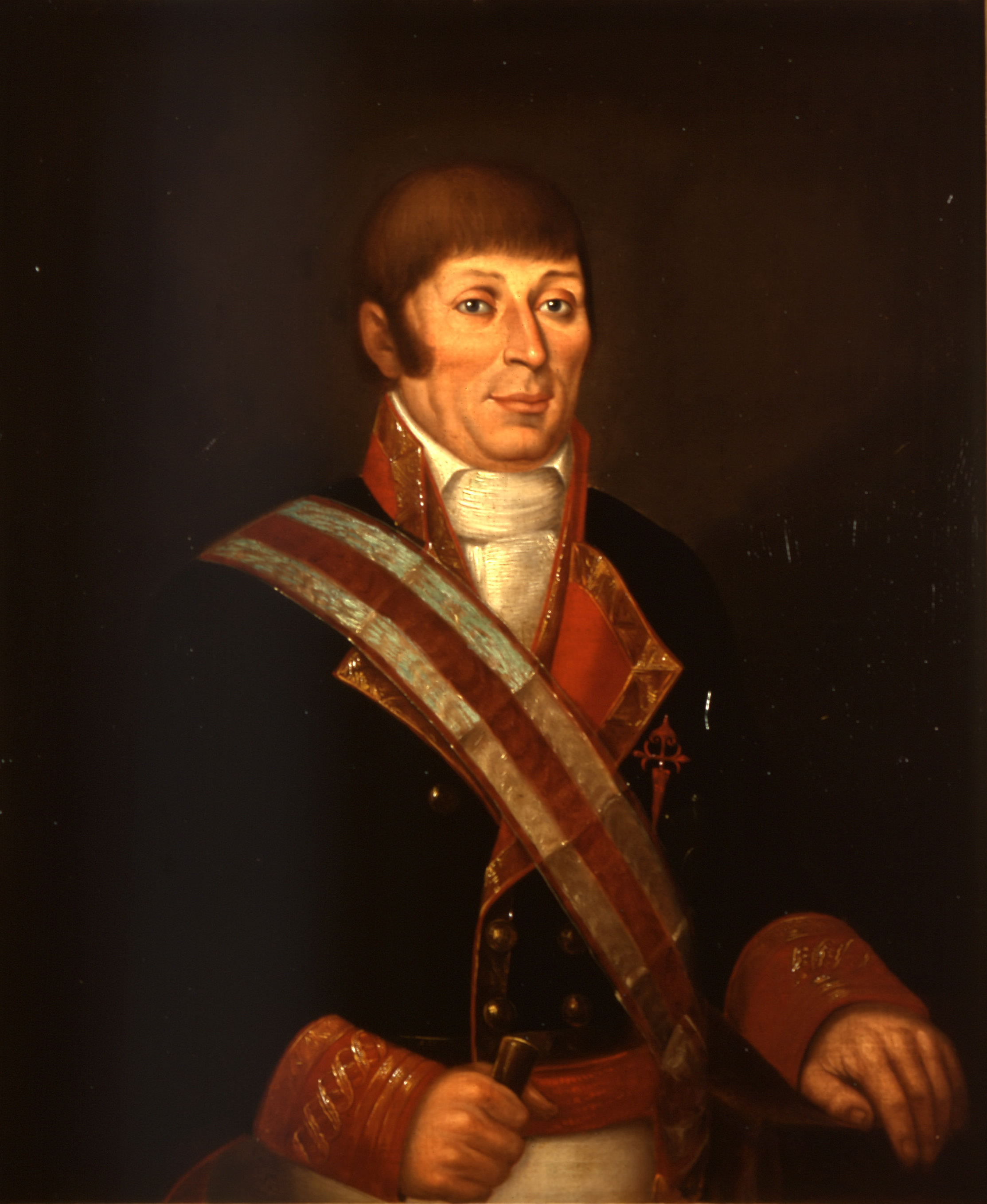 Retrato del marino español Francisco Antonio Mourelle de la Rúa (1755-1819).